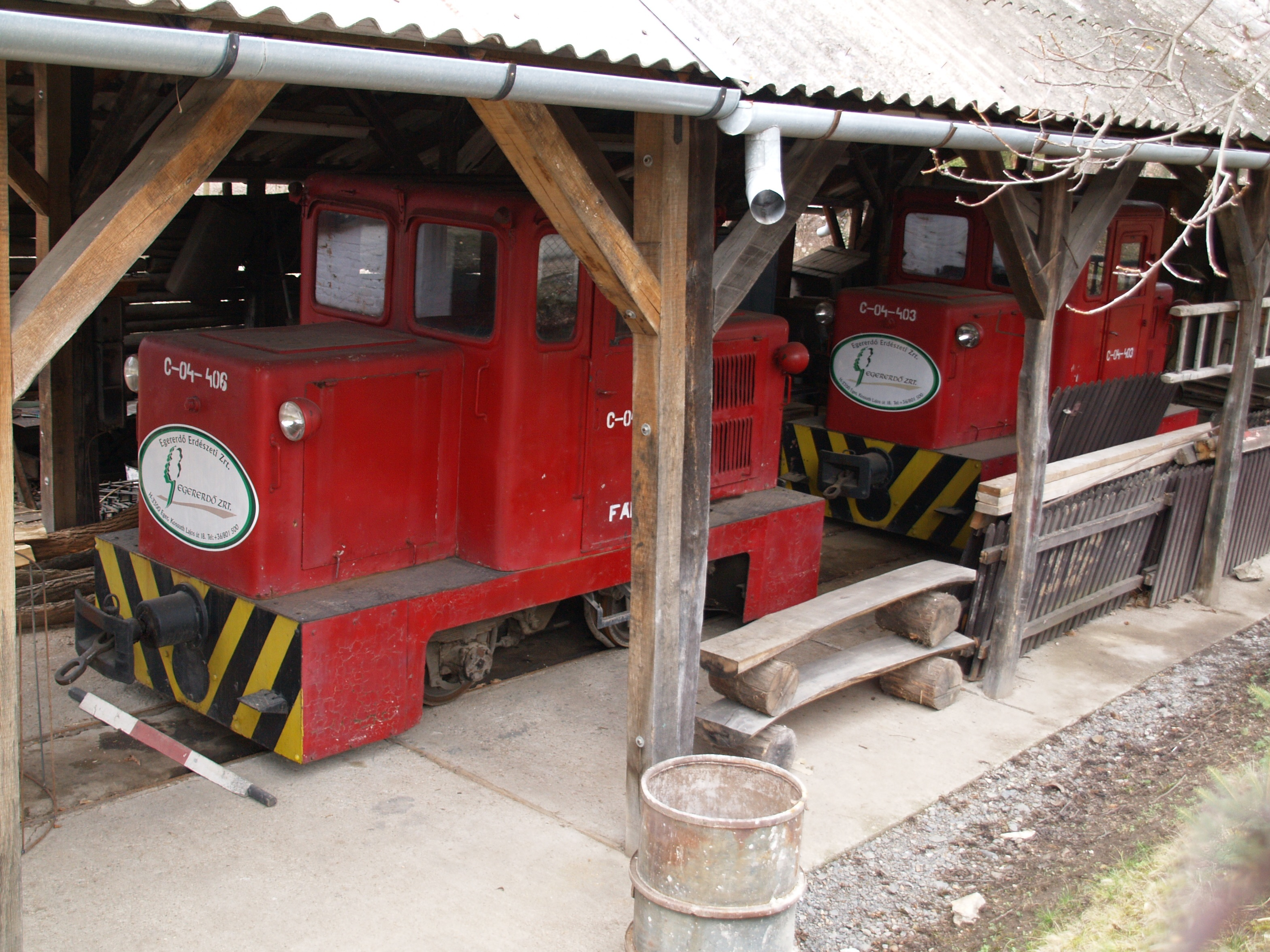 Pihenő C-50-es dízelmozdonyok Felsőtárkányban